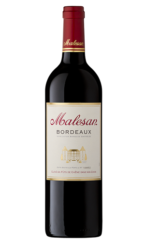 Bouteille de Malesan rouge